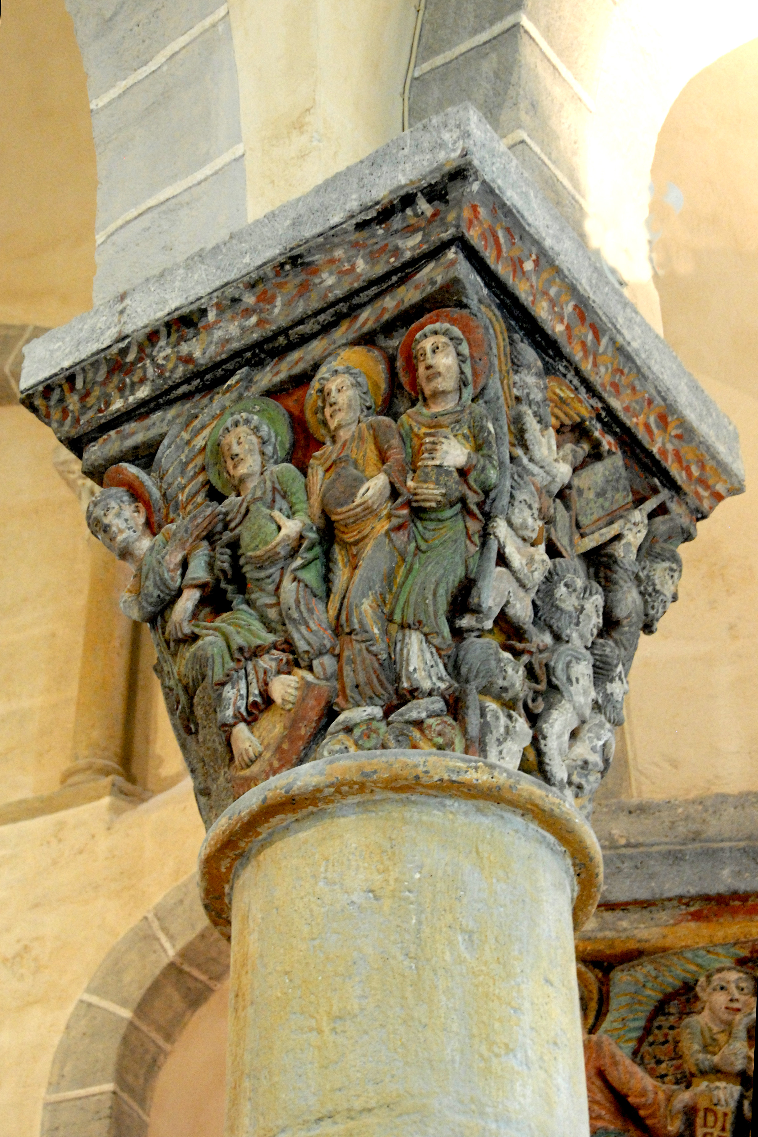 St.-Nectaire, Chorkapitell B, Seiten 8+5